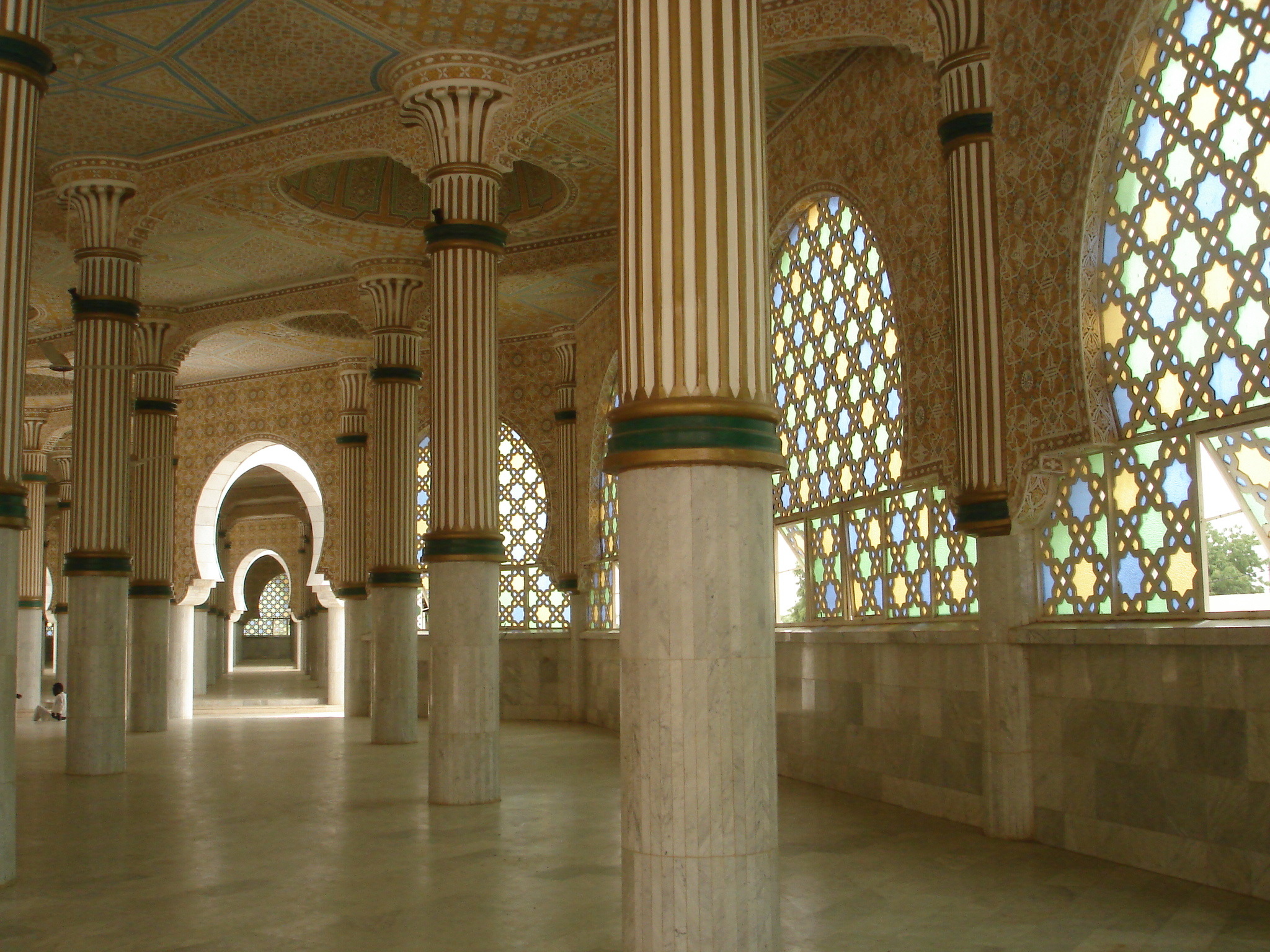 Intérieur de la mosquée de Touba (Sénégal). The central Mosque of the Mouride sufi order at Touba, Sengal